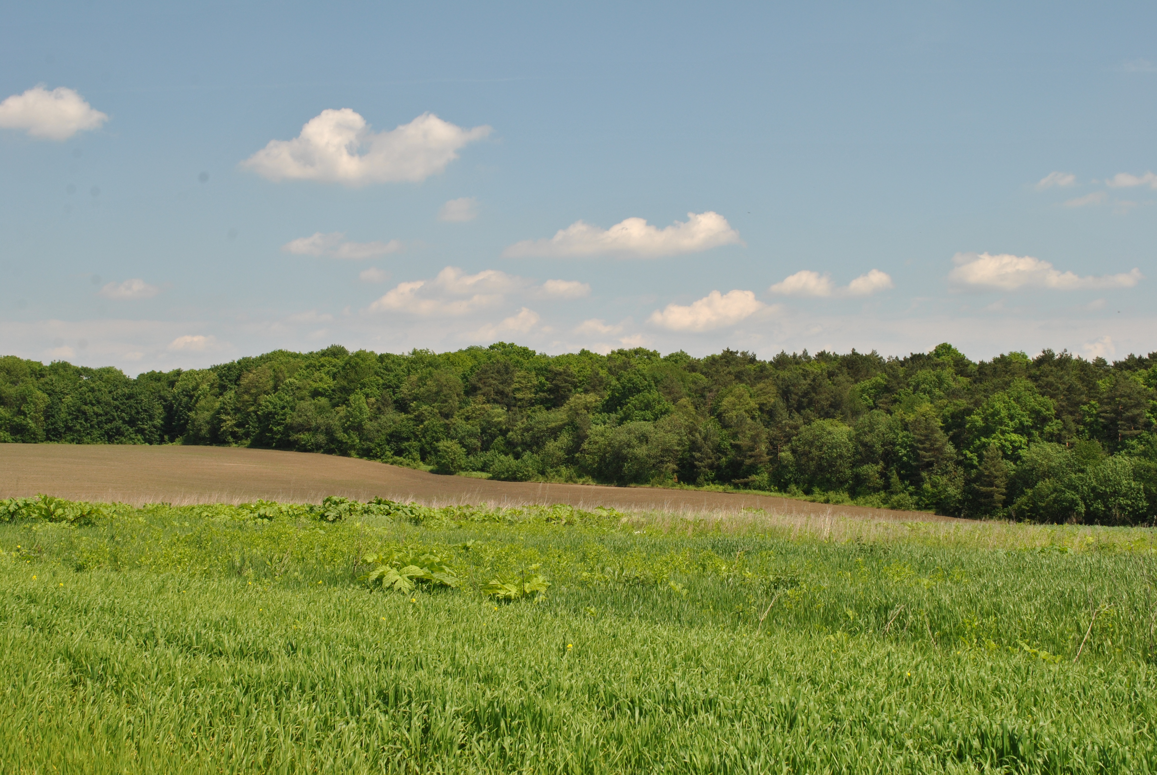 Вигляд на лісовий масив Тернопільського лісництва, в якому зростають ботанічні пам'ятки природи місцевого значення «Тернопільська діброва» і «Вікові дерева модрини», між селами Драганівка і Підгородне Тернопільського району Тернопільської області України.